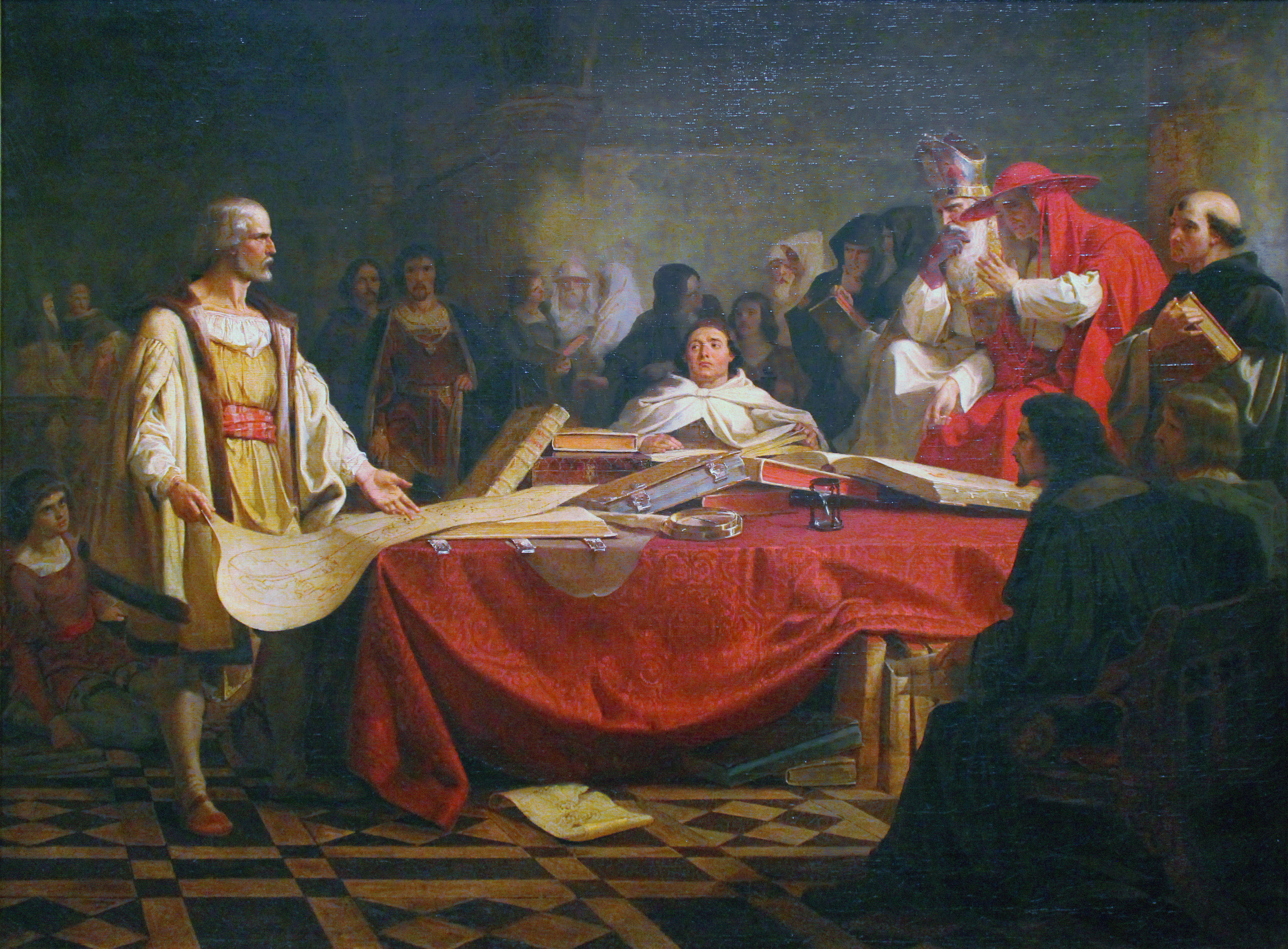 Christophe Colomb devant le conseil de Salamanque, peinture d'Emanuel Leutze en 1841, exposé au Musée des beaux-arts de Lyon en 2014.